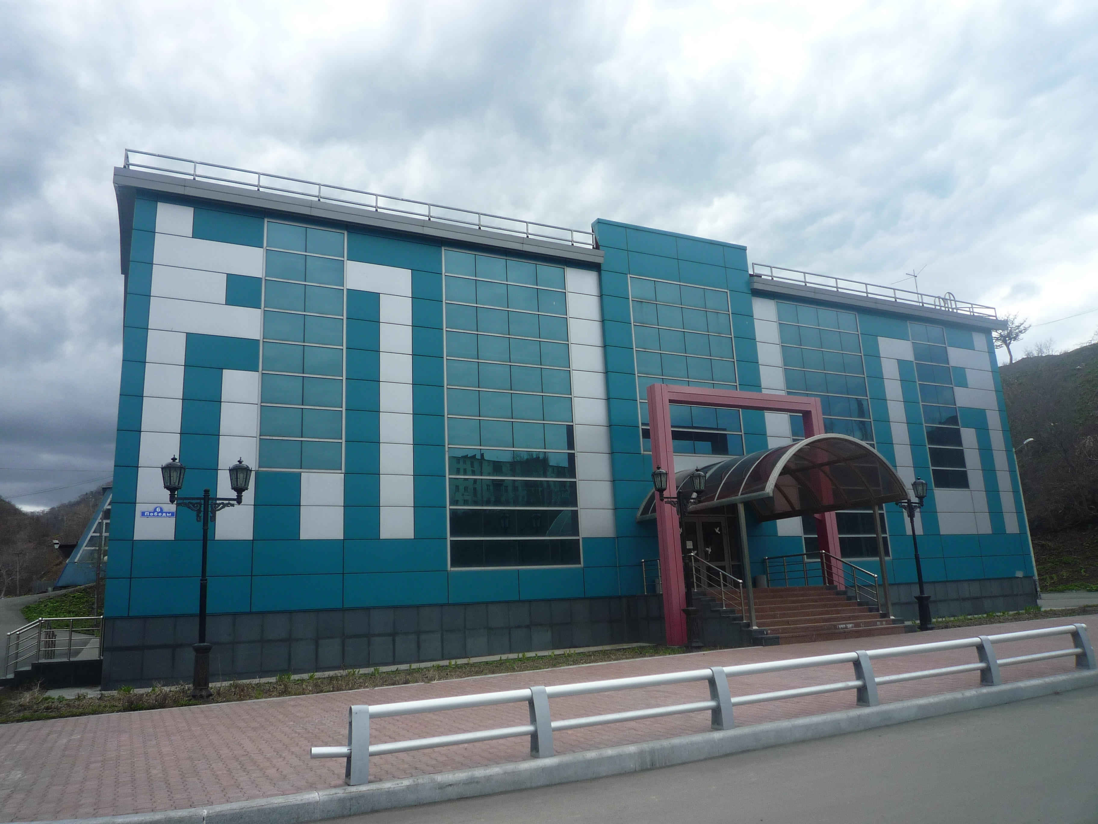 Плавательный бассейн (Холмск)